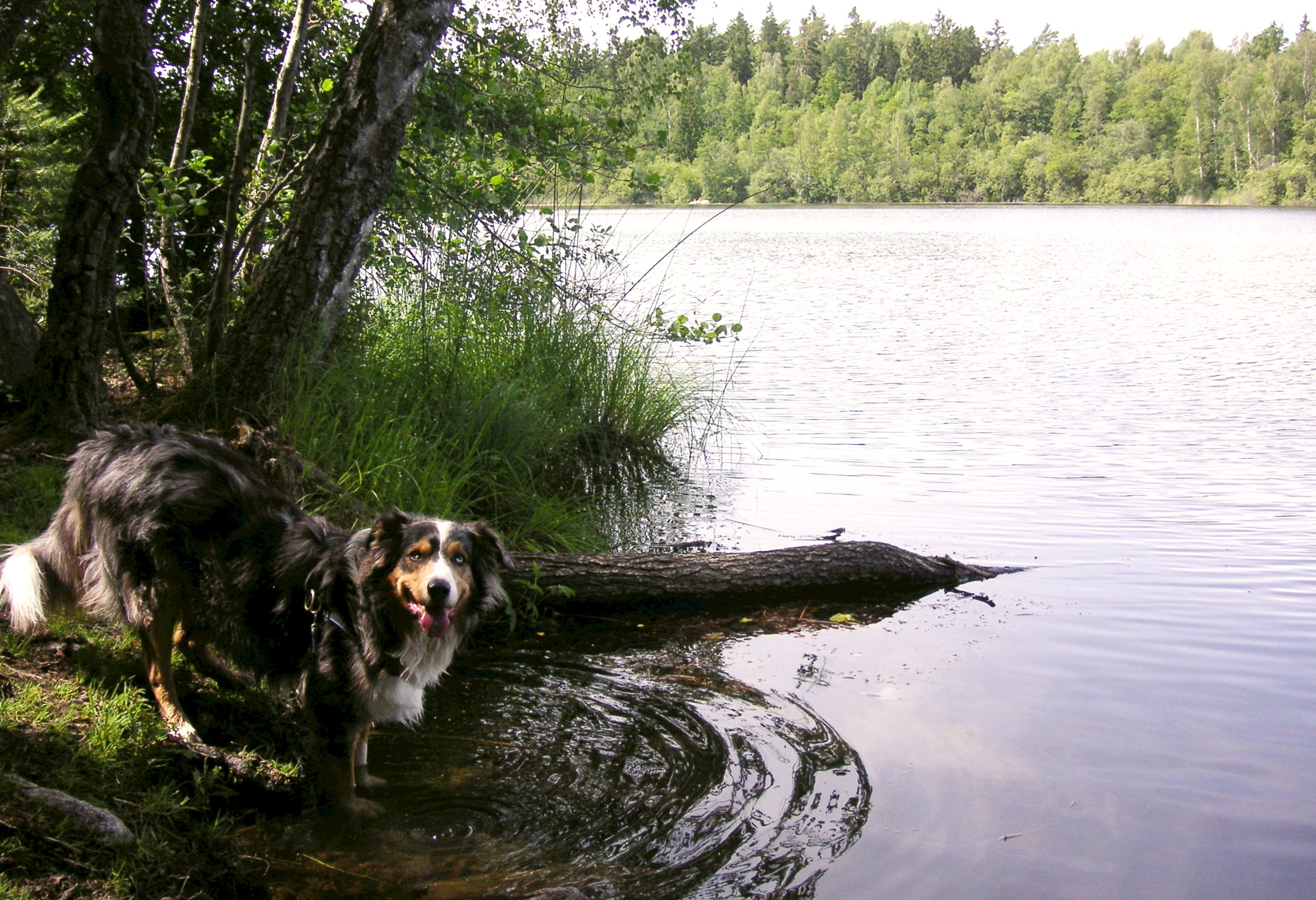 Judarskogens naturreservat i Nockeby-Åkeshov, Bromma, Stockholm